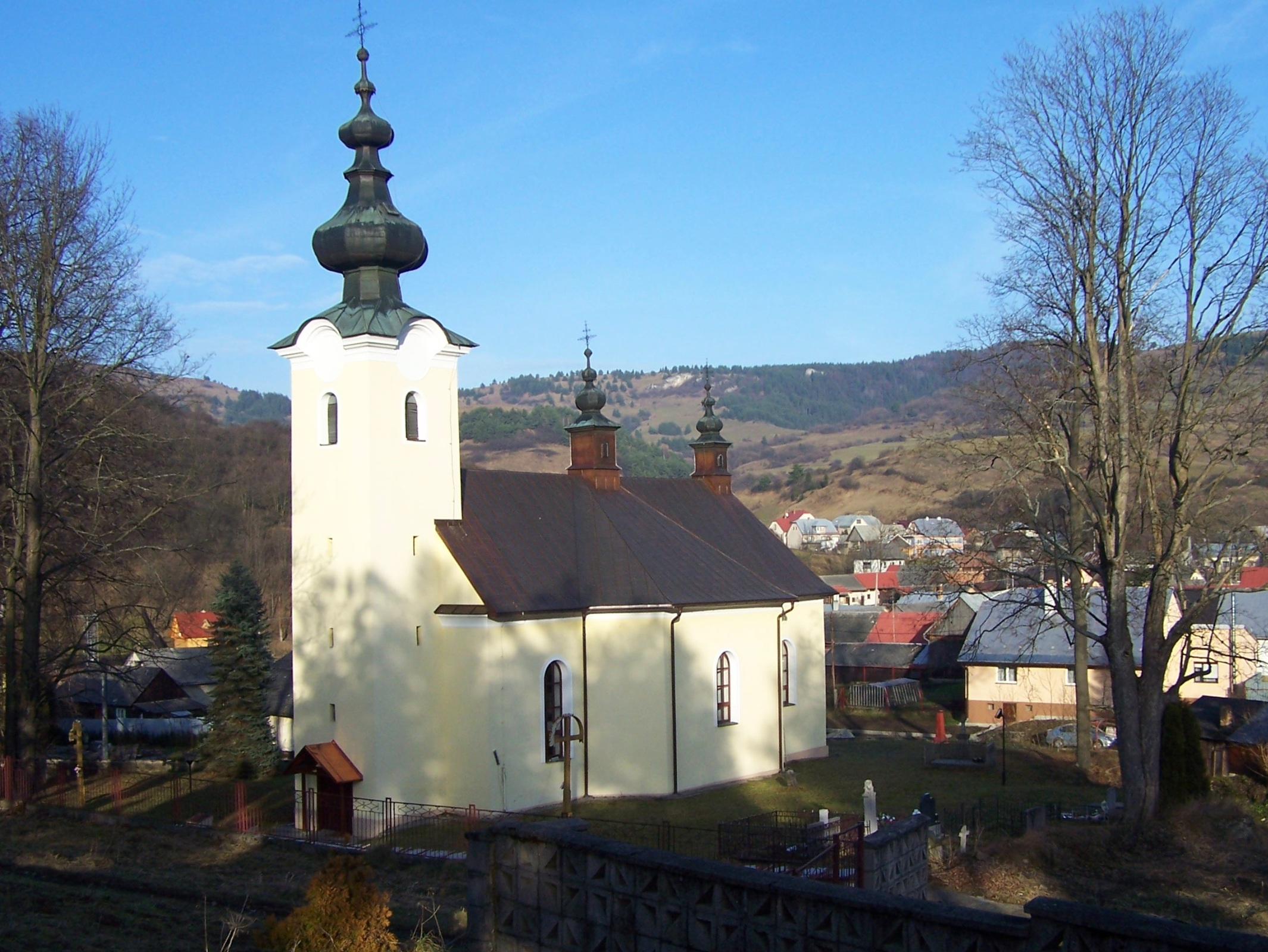 Veľký Lipník (Wielki Lipnik). Cerkiew św. Michała